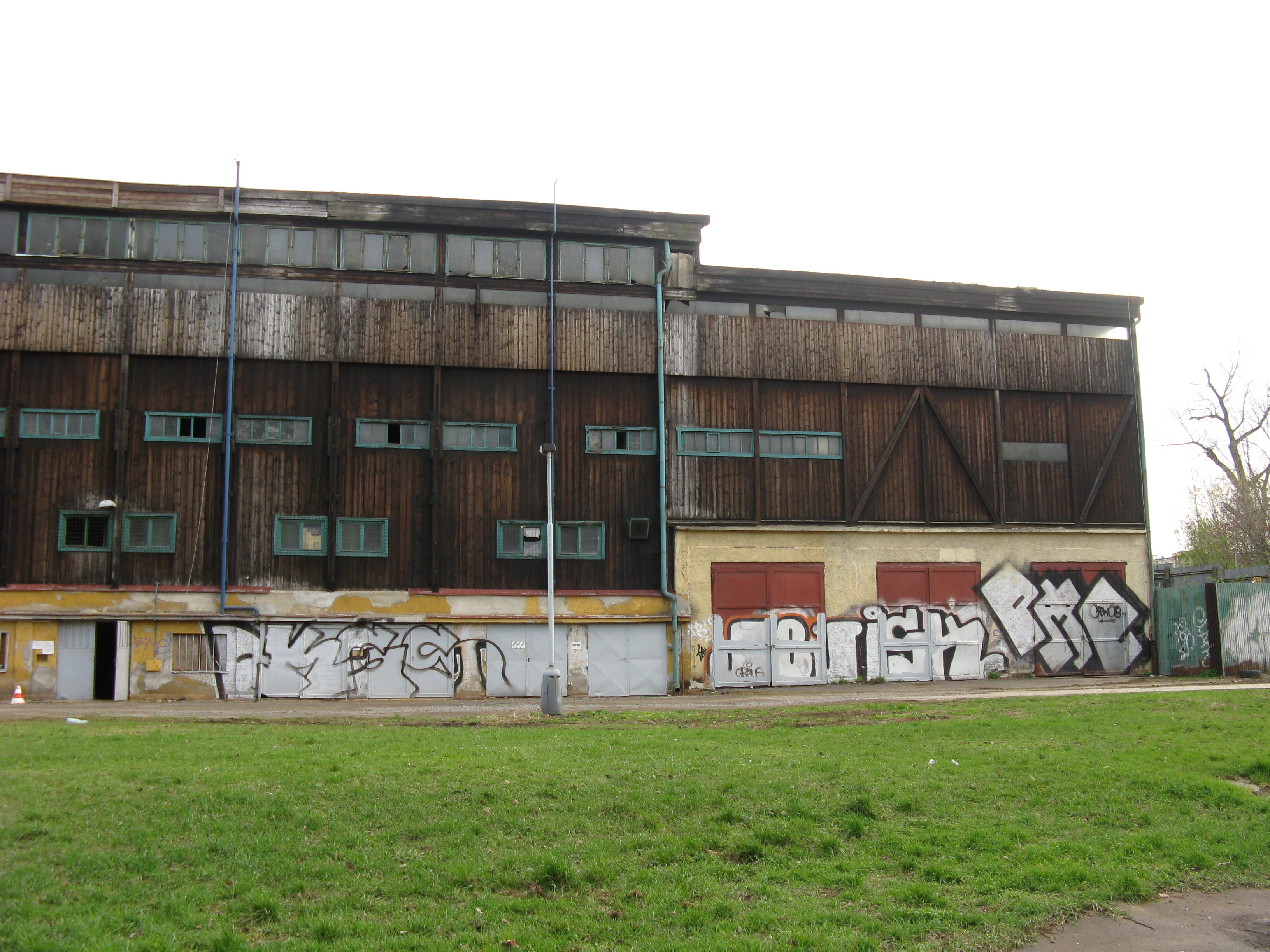 Zimní stadion na Štvanici, pohled z ostrova Štvanice na západní část severní strany.